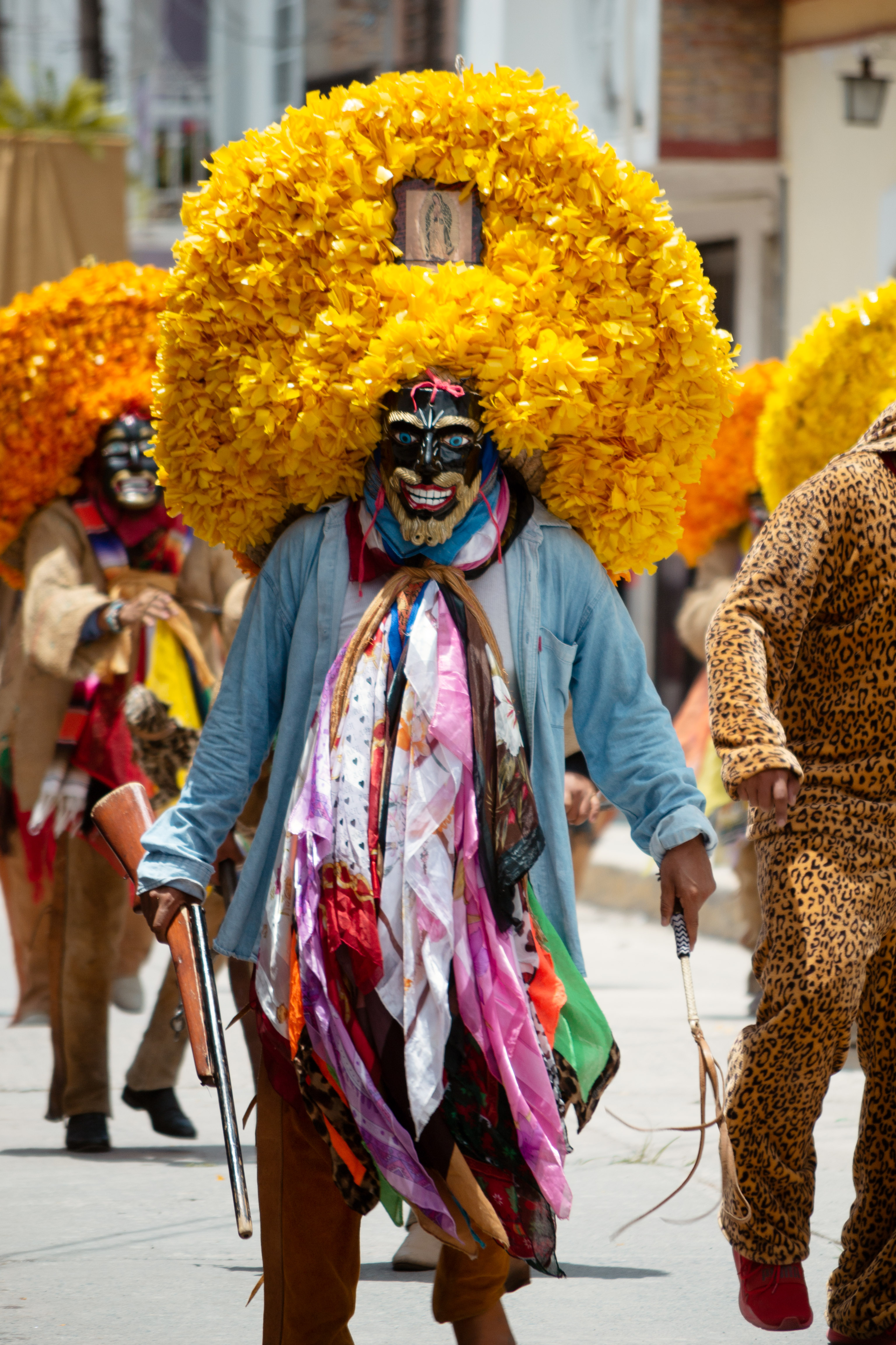 La danza de los Tlacololeros se celebra en todo el estado de Guerrero. Se trata de una tradición relacionada con la siembra y cosecha de cultivos. En Tixtla, Guerrero, la Fiesta de Pendón se lleva a cabo a mediados de agosto de cada año. Los Tlacololeros forman parte de esta celebración.